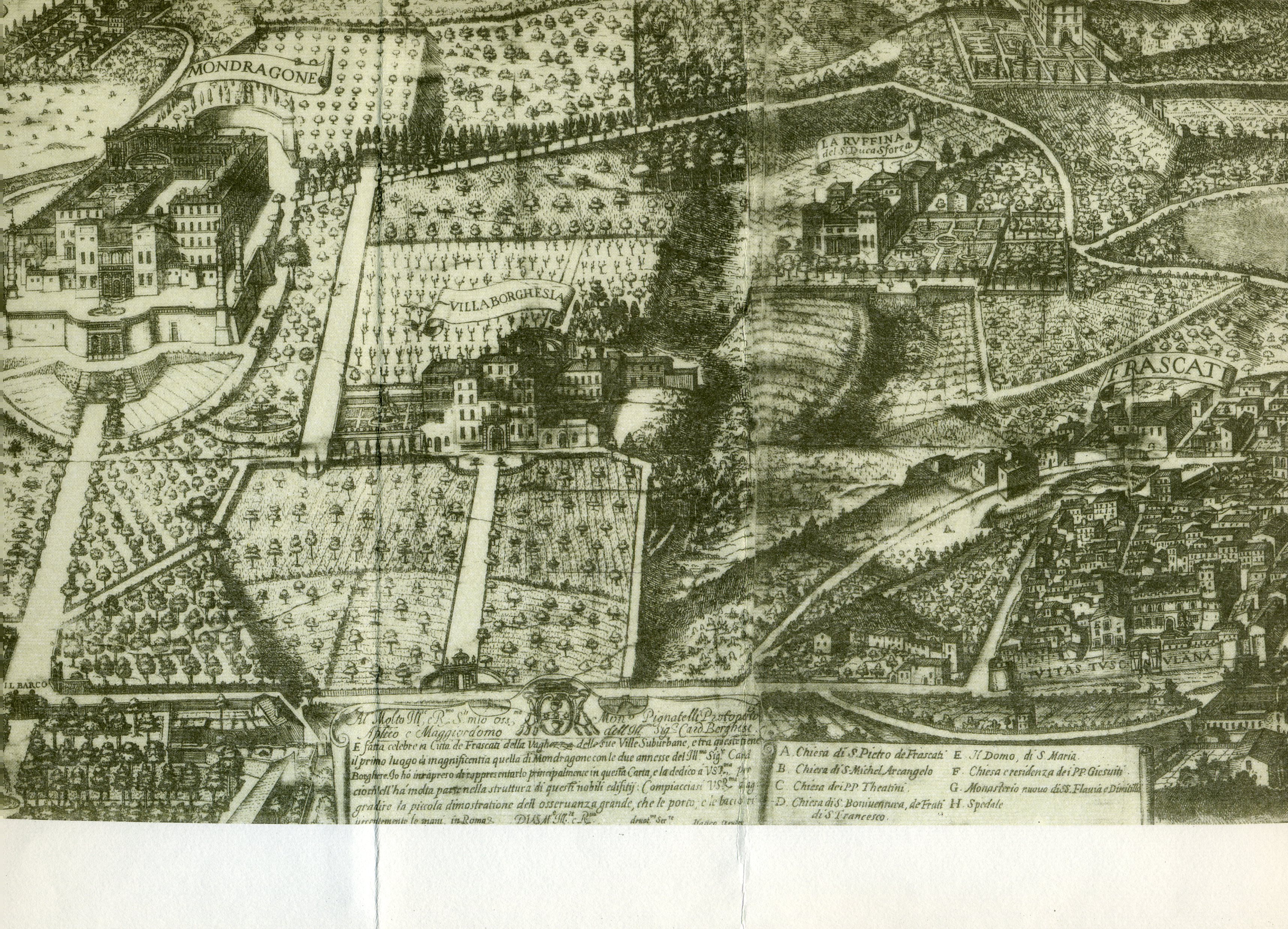 Foto della stampa del 1620 di Matteo Greuter con la villa Parisi-Borghese